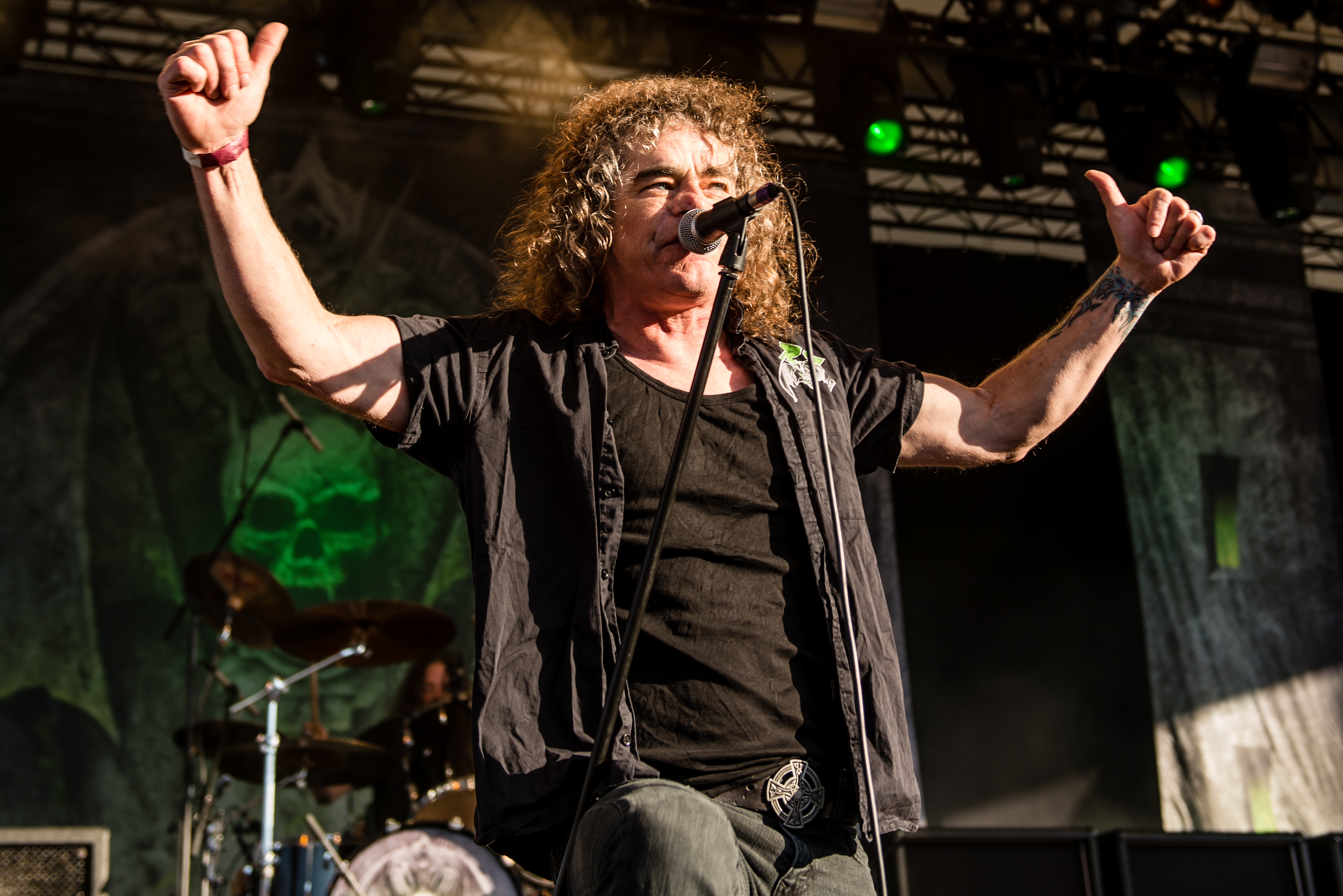 'Rock Hard Festival 2015; Gelsenkirchen Amphitheater': 'Overkill'